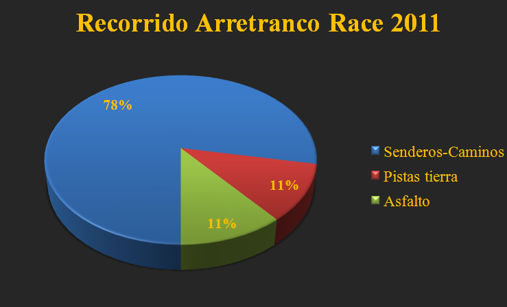 trazado